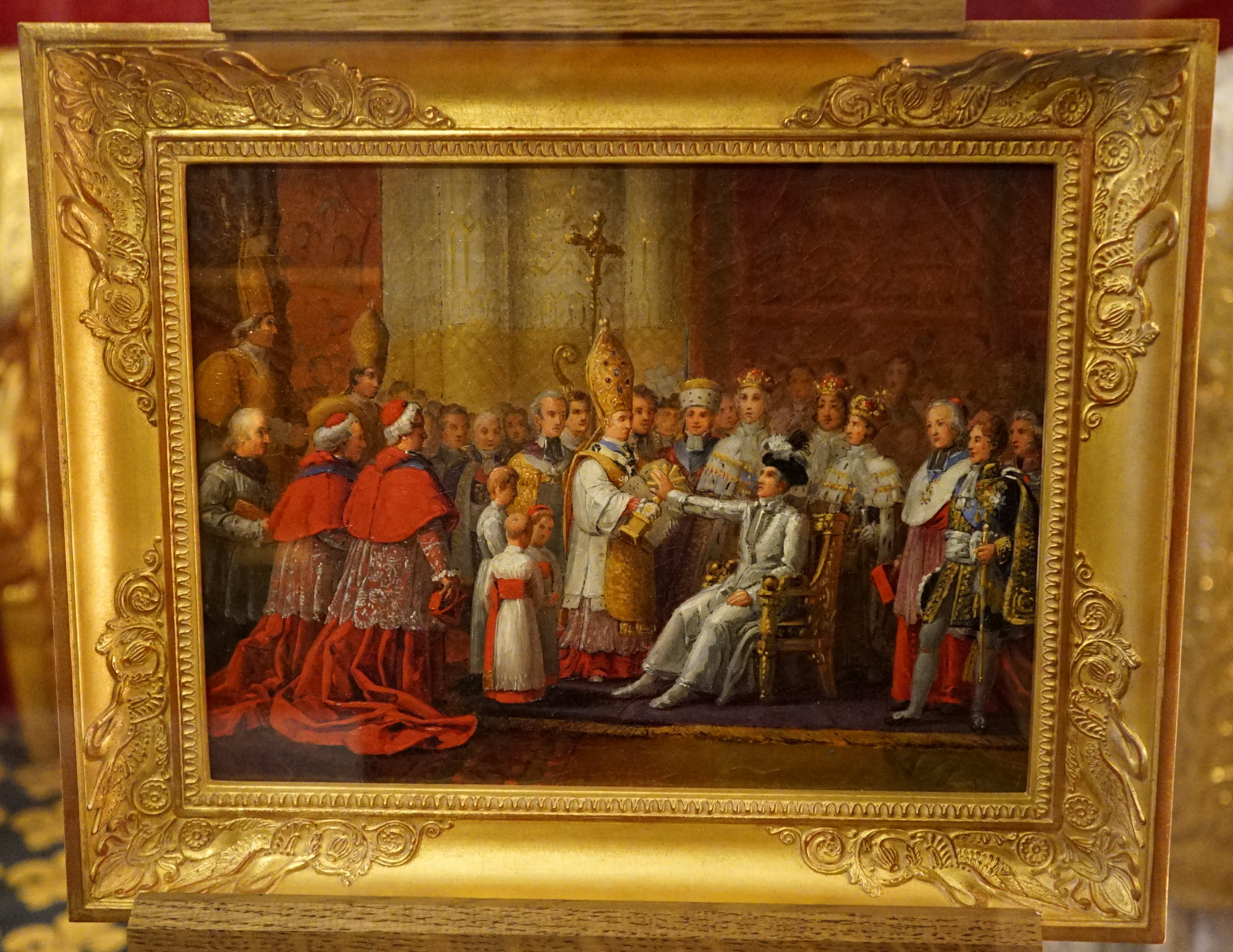 proposé lors de la nuit des cathédrale de 2019 à Reims.